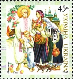 Марка з серії "Народний одяг України" 2002 Вінниччина Спаса